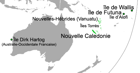 Crop de File:Carte-Anachronique-des-tout-les-empires-francais(1534-1980).png (auteur : Hypersite) autour de l'Australie.